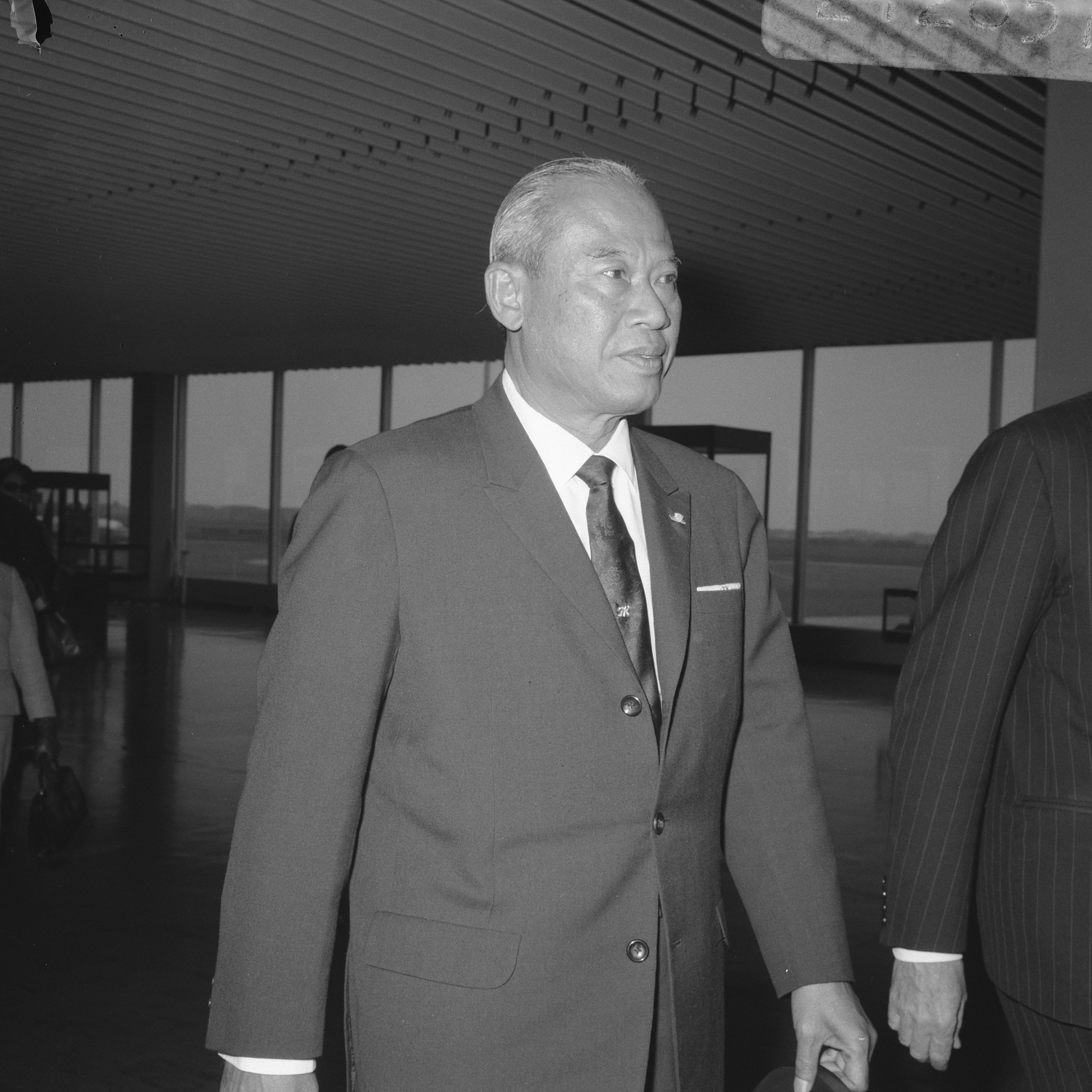 Collectie / Archief : Fotocollectie Anefo Reportage / Serie : [ onbekend ] Beschrijving : Aankomst minister president van Thailand Z. E. veldmaarschalk Thanom Kittikachorn op Schiphol (links), rechts baron Gevers die hem verwelkomde Datum : 25 april 1968 Locatie : Noord-Holland, Schiphol Trefwoorden : aankomsten Persoonsnaam : baron Gevers Fotograaf : Evers, Joost / Anefo Auteursrechthebbende : Nationaal Archief Materiaalsoort : Negatief (zwart/wit) Nummer archiefinventaris : bekijk toegang 2.24.01.03 Bestanddeelnummer : 921-2857